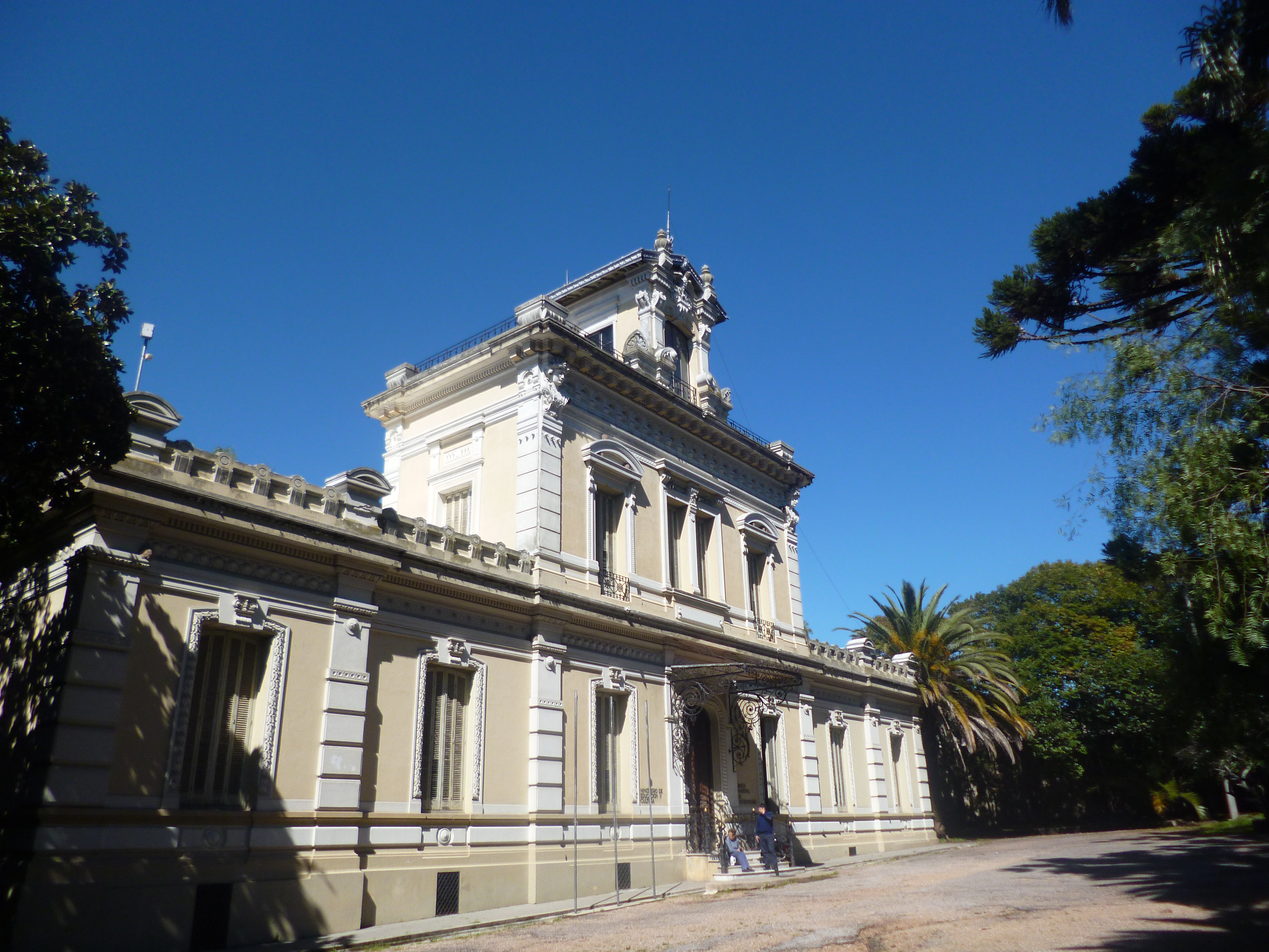 Casa quinta de la Flia. Mendilaharsu. Ubicada en el departamento de Montevideo